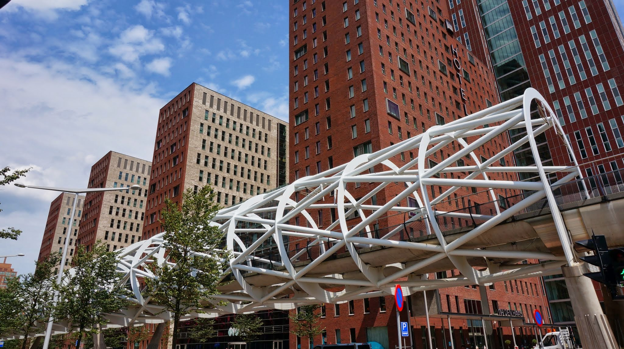 Bezuidenhout-West, 2595 Den Haag, Netherlands